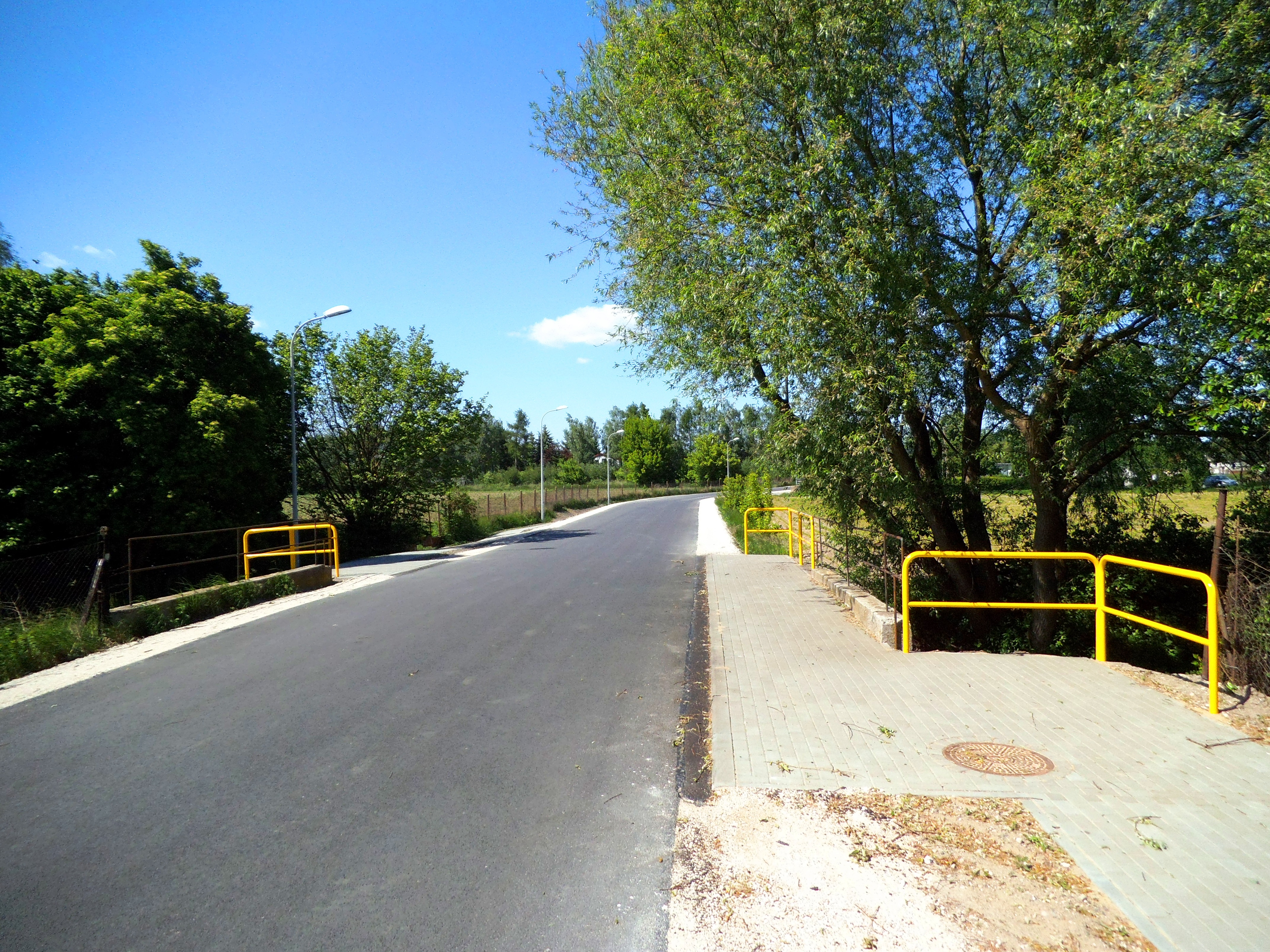 Ulica Zagrodowa w Toruniu